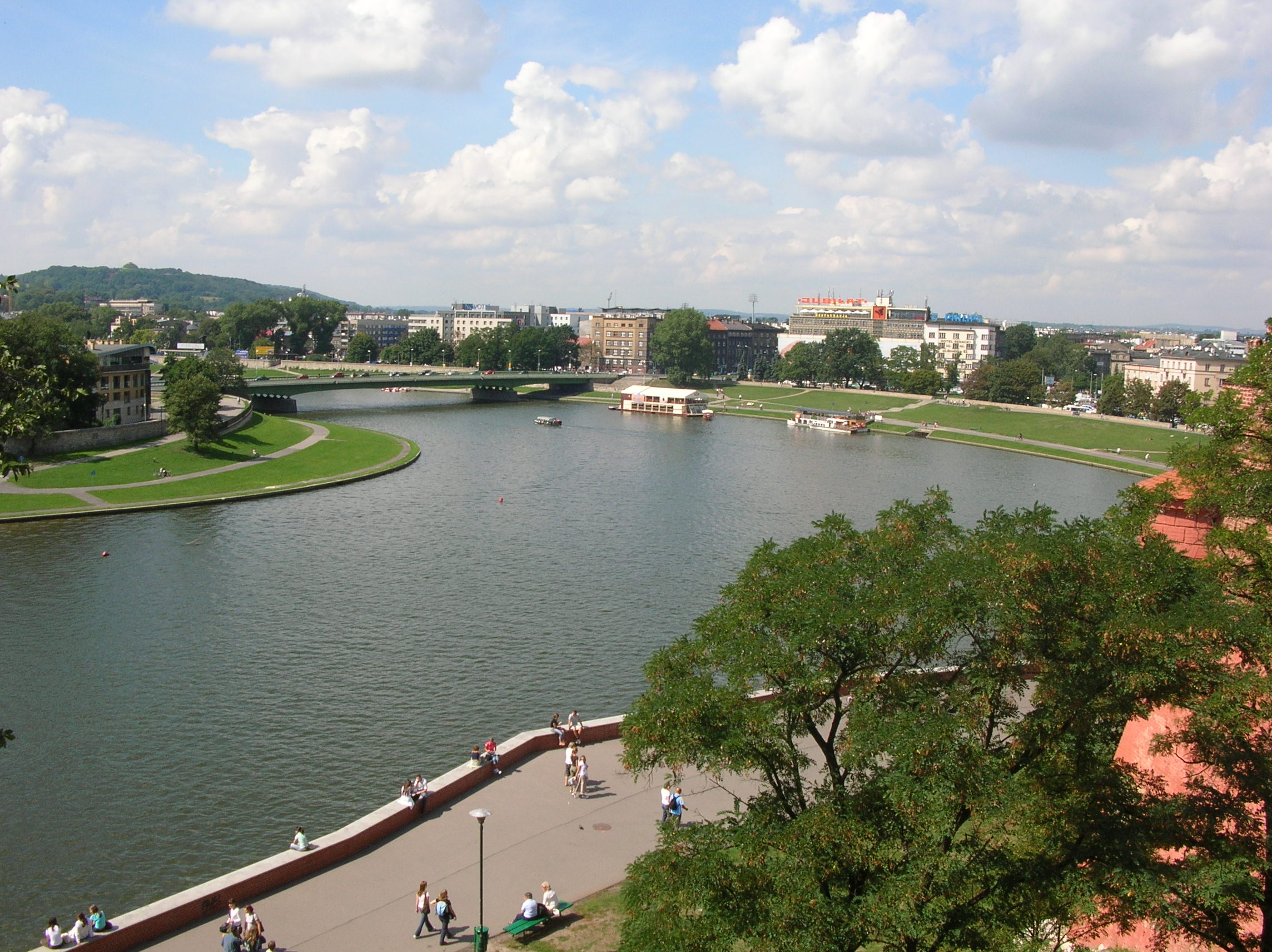 Wisła przepływająca przez Kraków